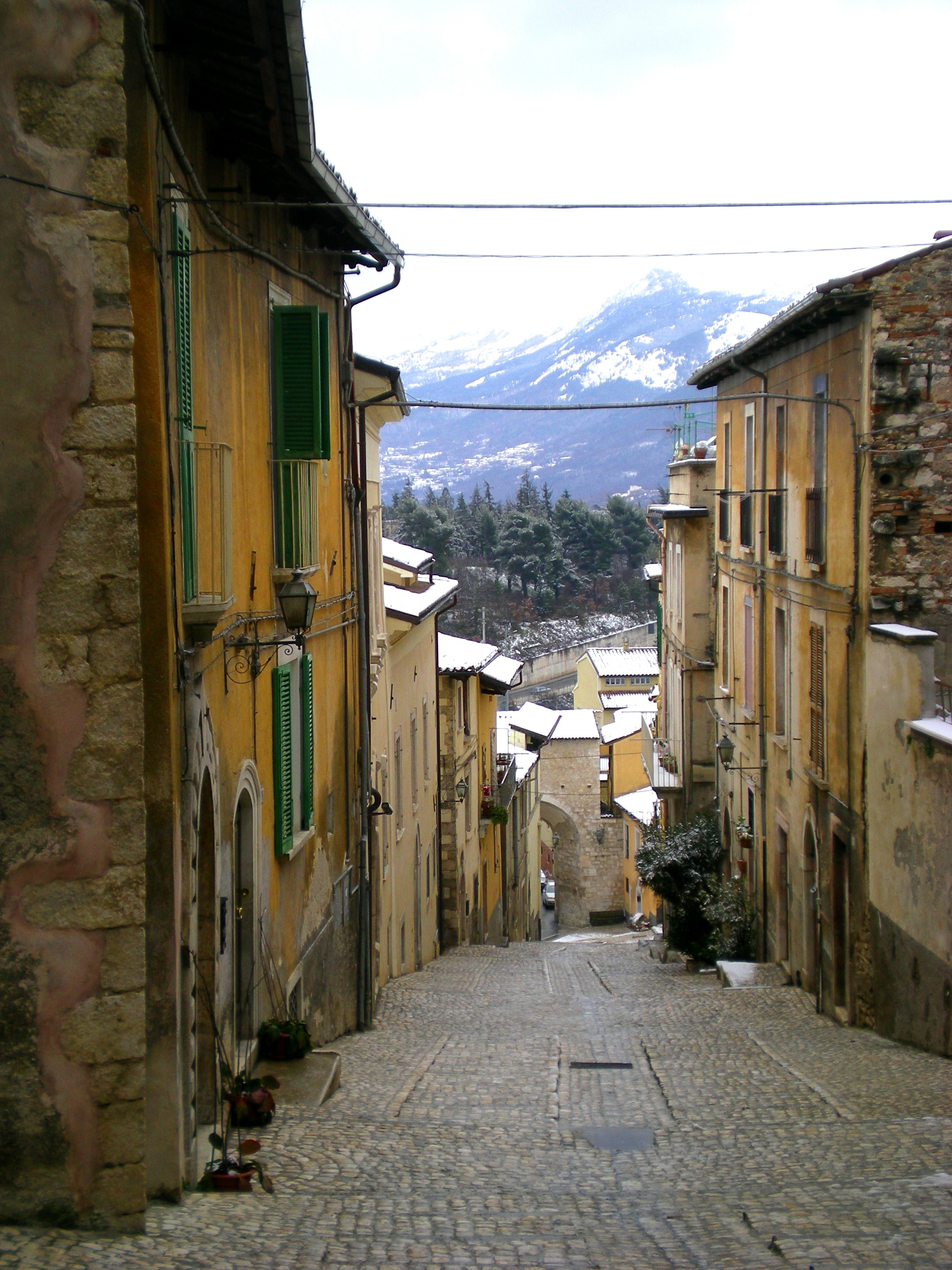 Costa Masciarelli con la Porta Bazzano e il Gran Sasso sullo sfondo